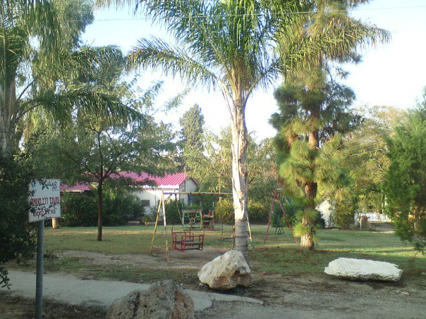 Regavim. רגבים: גני הקיבוץ